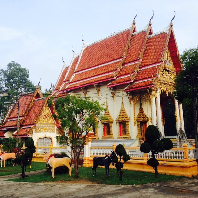 วัดบ้านฆ้อง